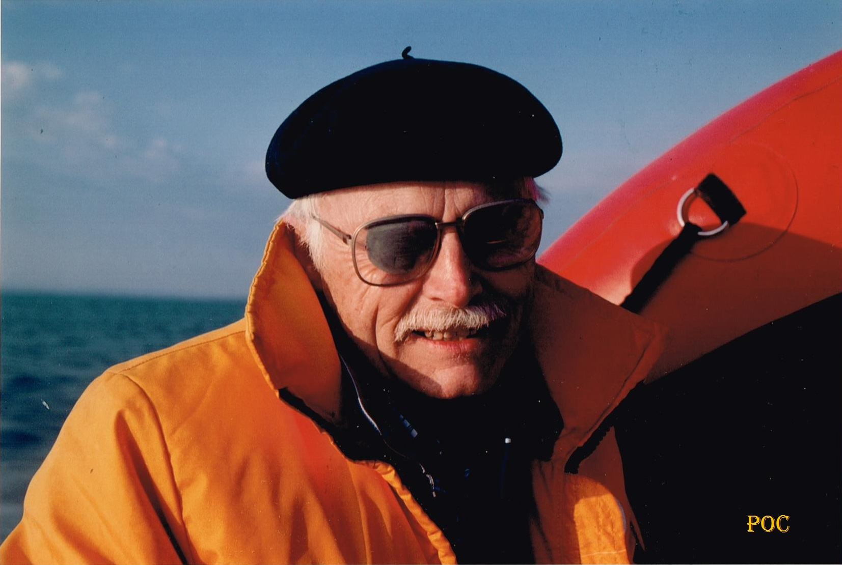 Portrait de Frédérick Back en mer dans l'archipel des Migan (Basse Côte-Nord du Québec) en juillet 1989, lors de mon expédition en voilier dans le sillage de John James Audubon.